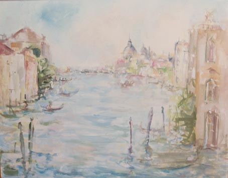 Venise, gouache sur panneau par Enrico Campagnola.